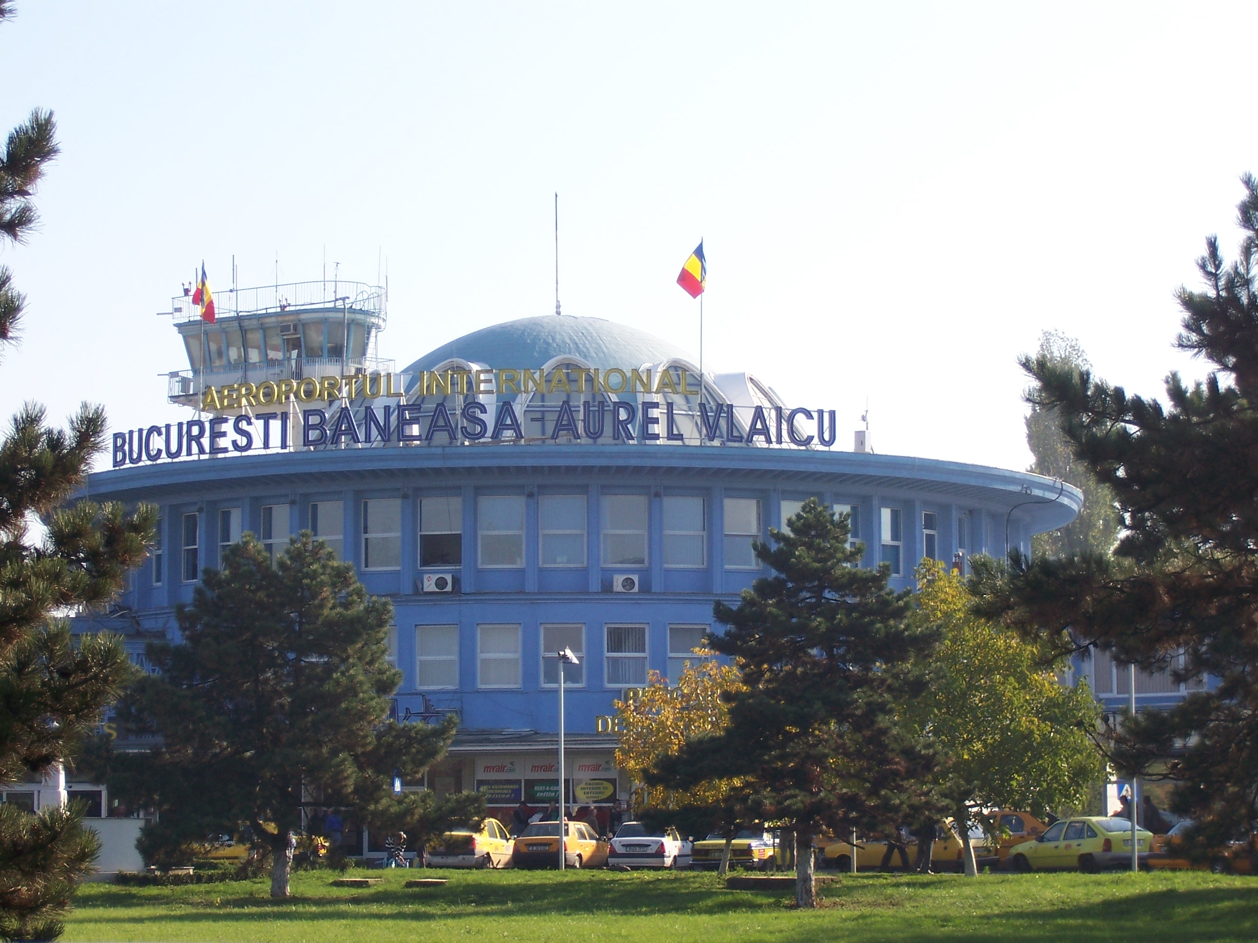 Aerogara Băneasa vedere din spre sensul giratoriul din fata aerogării.